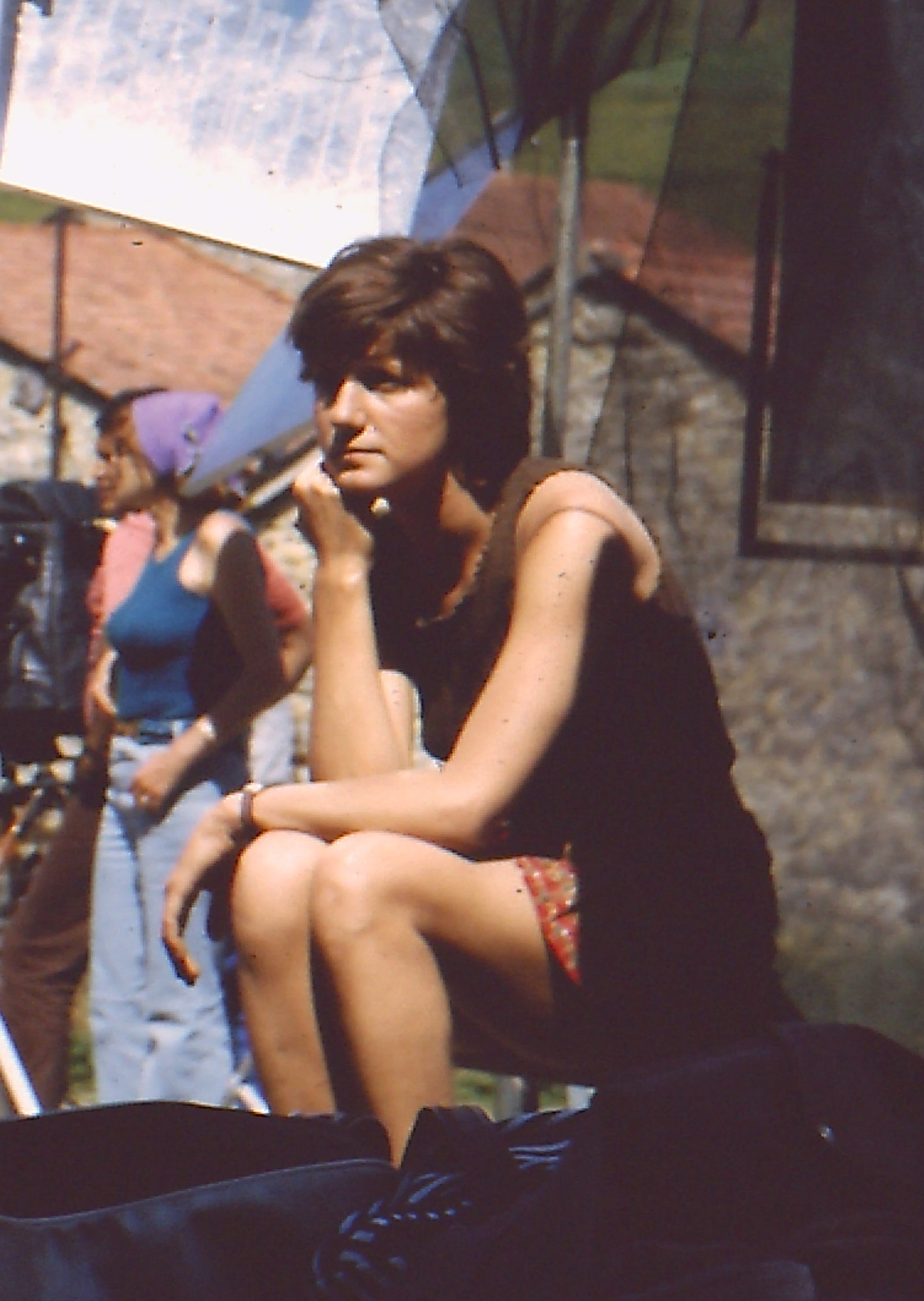 L'actrice Dominique Labourier sur le tournage de Beau Masque en 1972.